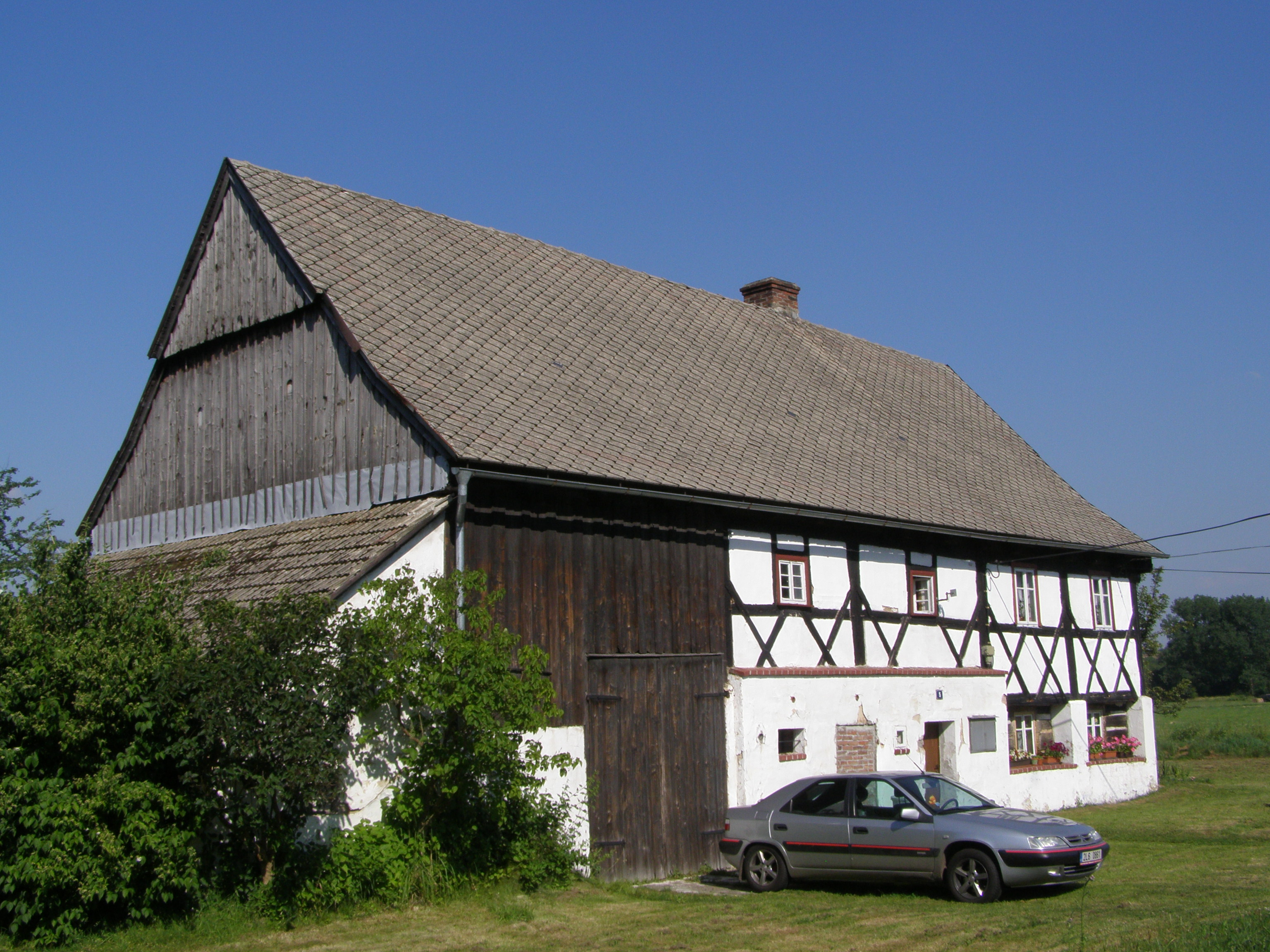 Černousy, Ves, hrázděný dům čp. 5